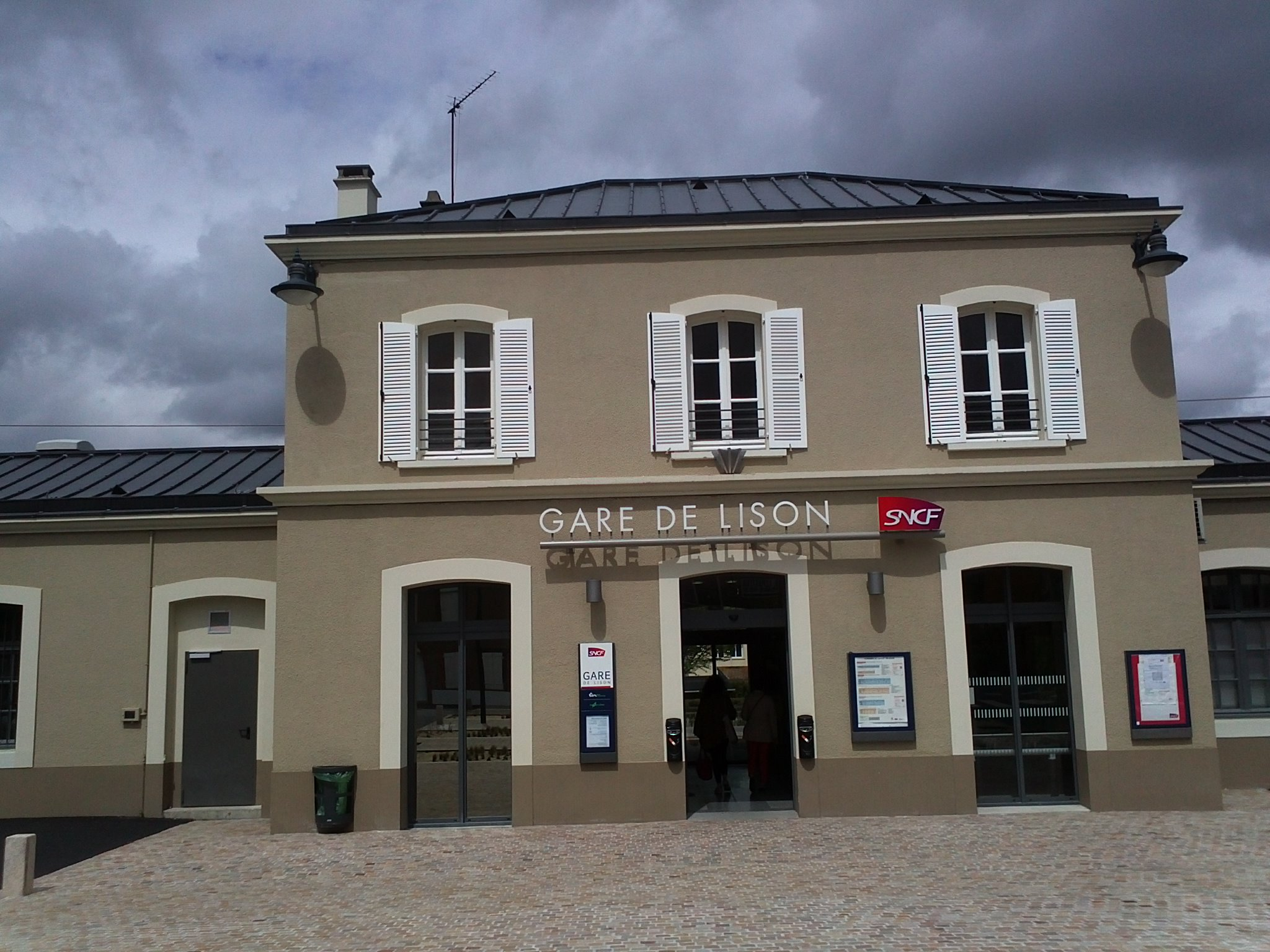 gare de Lison